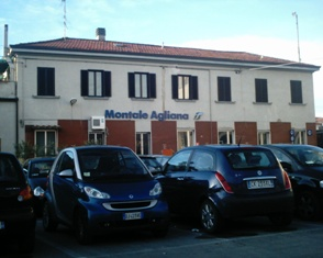 Esterno del fabbricato della stazione di Agliana-Montale